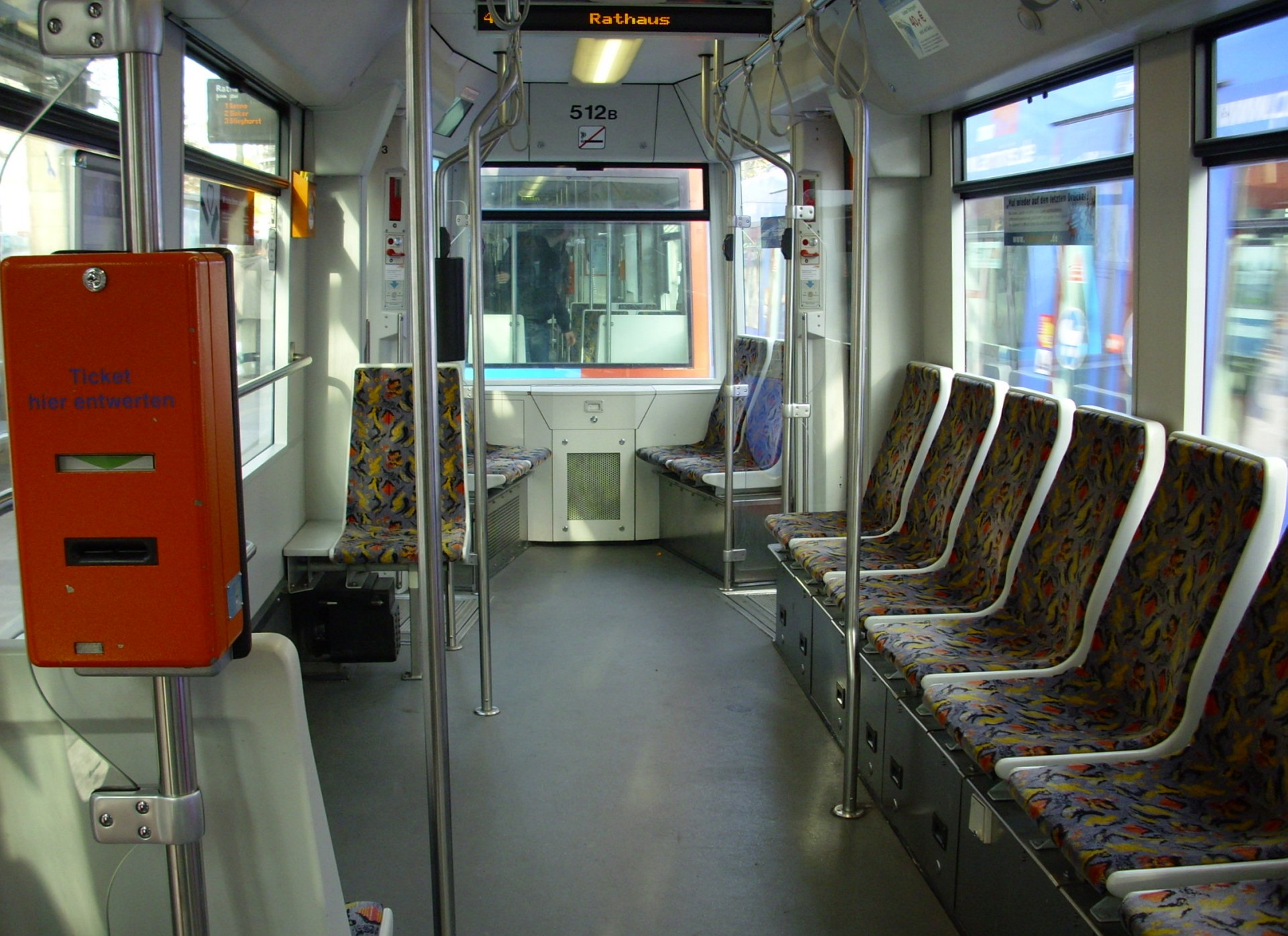 Doczepa bierna MB4 (prod. Siemens / AD Tranz) – wnętrze.